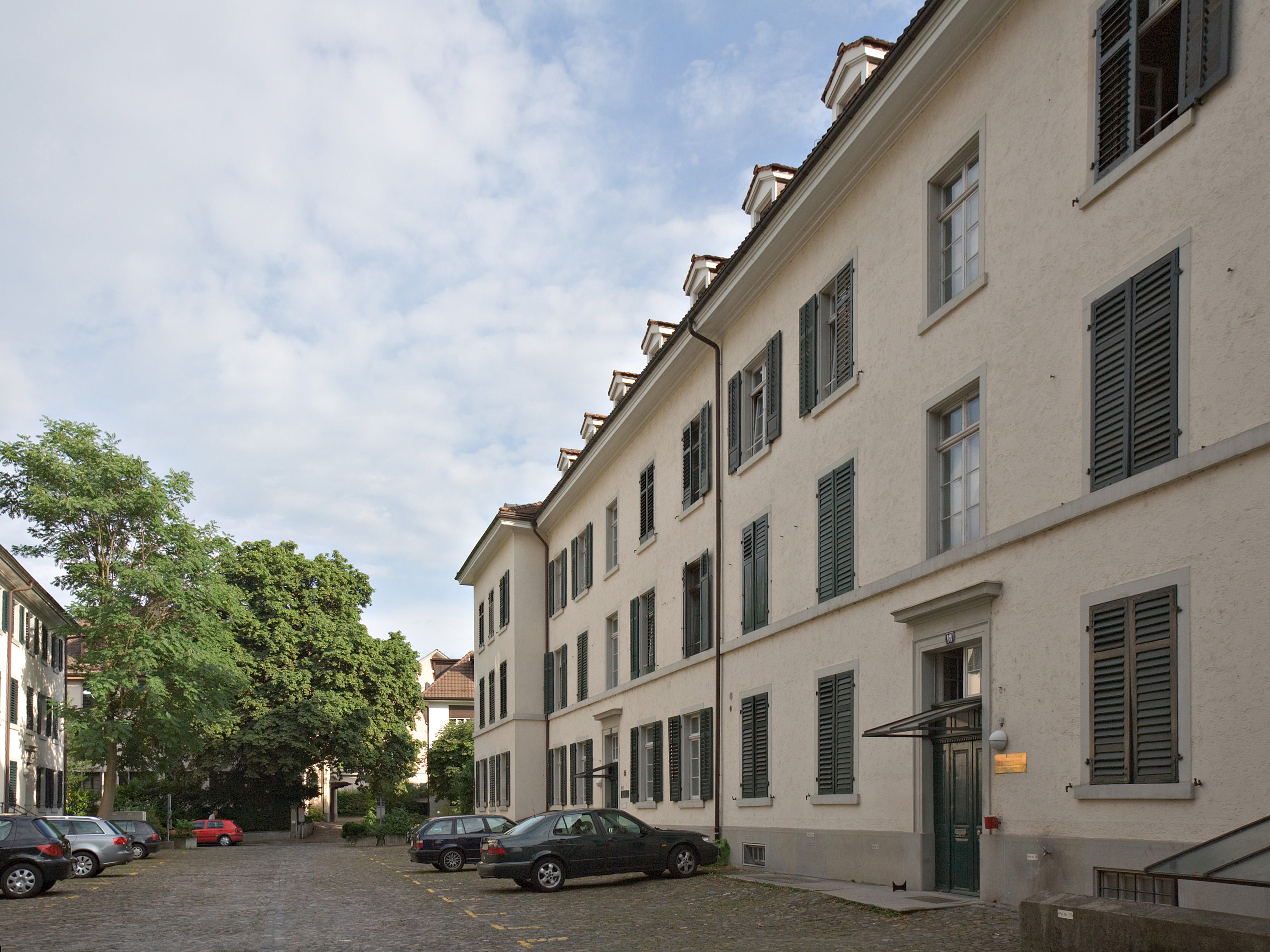 Innenhof der Escherhäuser in Zürich, Schweiz Die Escherhäuser am Zeltweg wurden von Leonhard Zeugheer gebaut, sie waren die ersten Mietshäuser in Zürich. Heute beherbergen sie unter anderem ein portugiesisches Konsulat. Hier wohnten Johanna Spyri und Richard Wagner während seines Exils